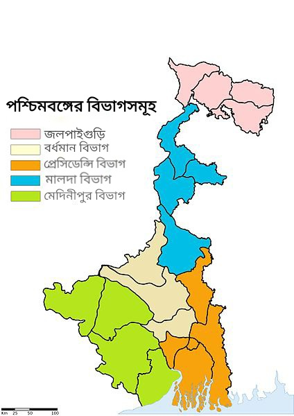 চিত্রটি পশ্চিমবঙ্গের বিভাগীয় মানচিত্র সম্পর্কি।